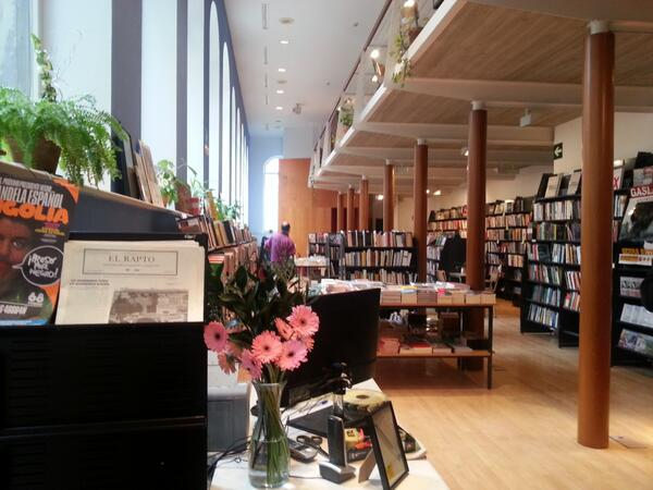 Katakrak barrualdea.